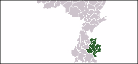 Locatie Parkstad Limburg-gemeenten. Gebaseerd op afbeelding gemaakt door Gebruiker:Mtcv